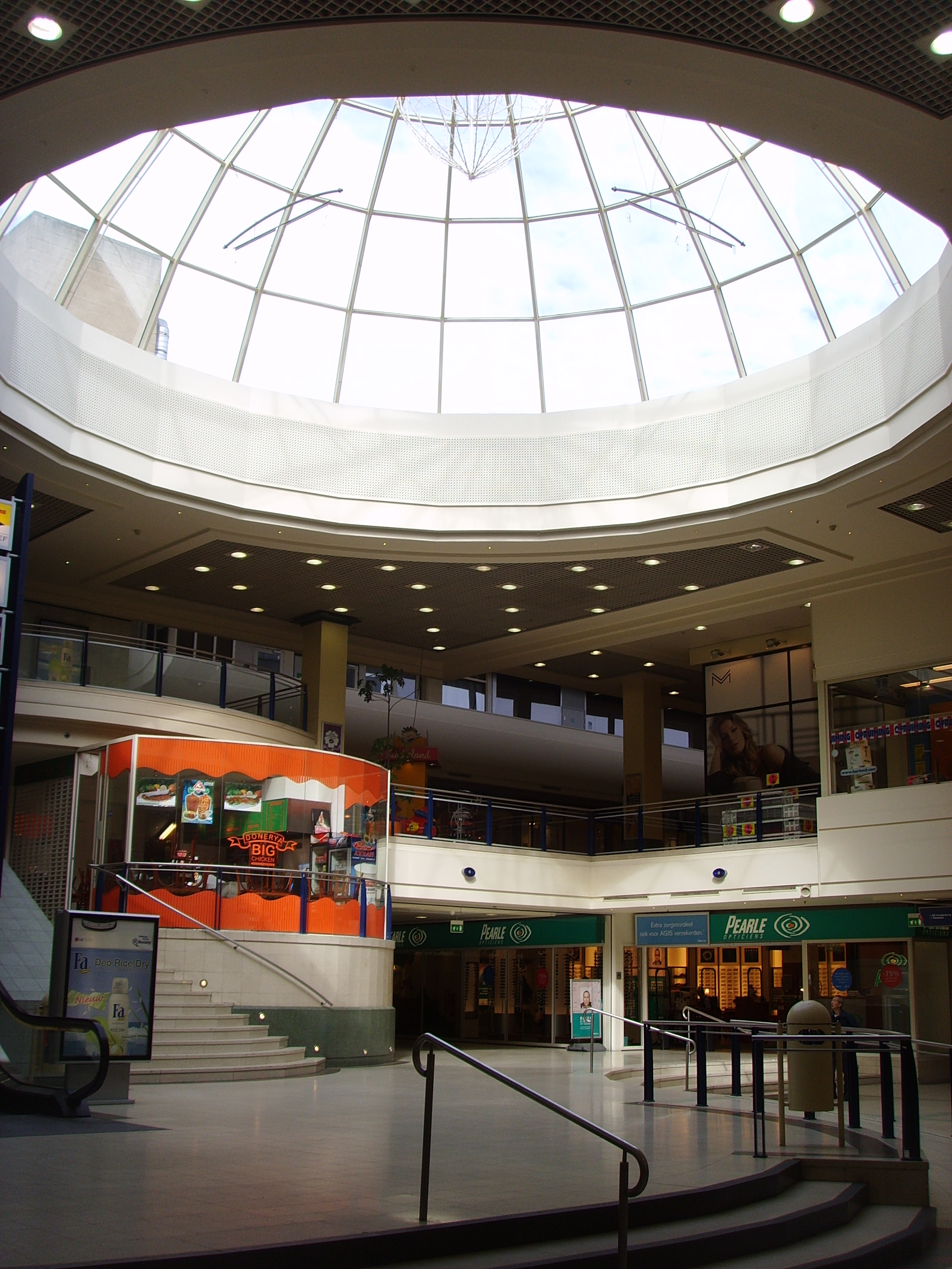 Hal met glazen koepel in het noordwesten van winkelcentrum Hoog Catharijne in de binnenstad van Utrecht - Google Maps - Google Earth